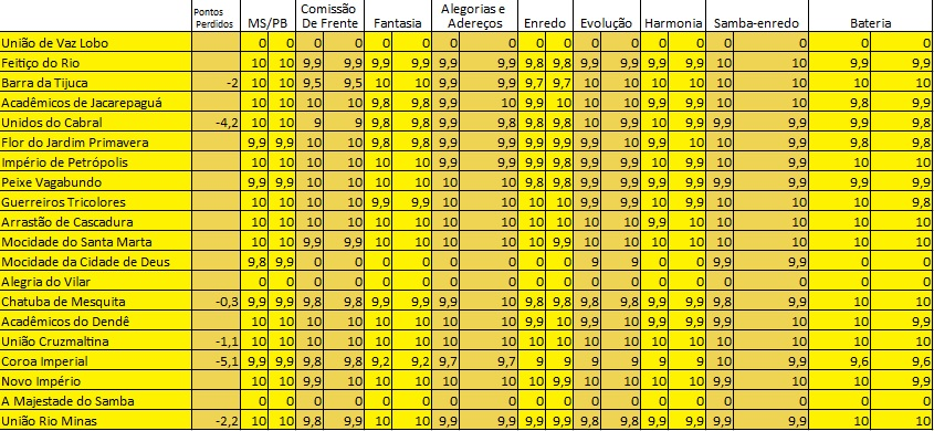 Resultados do Carnaval do Rio em 2020 - Grupo de avaliação